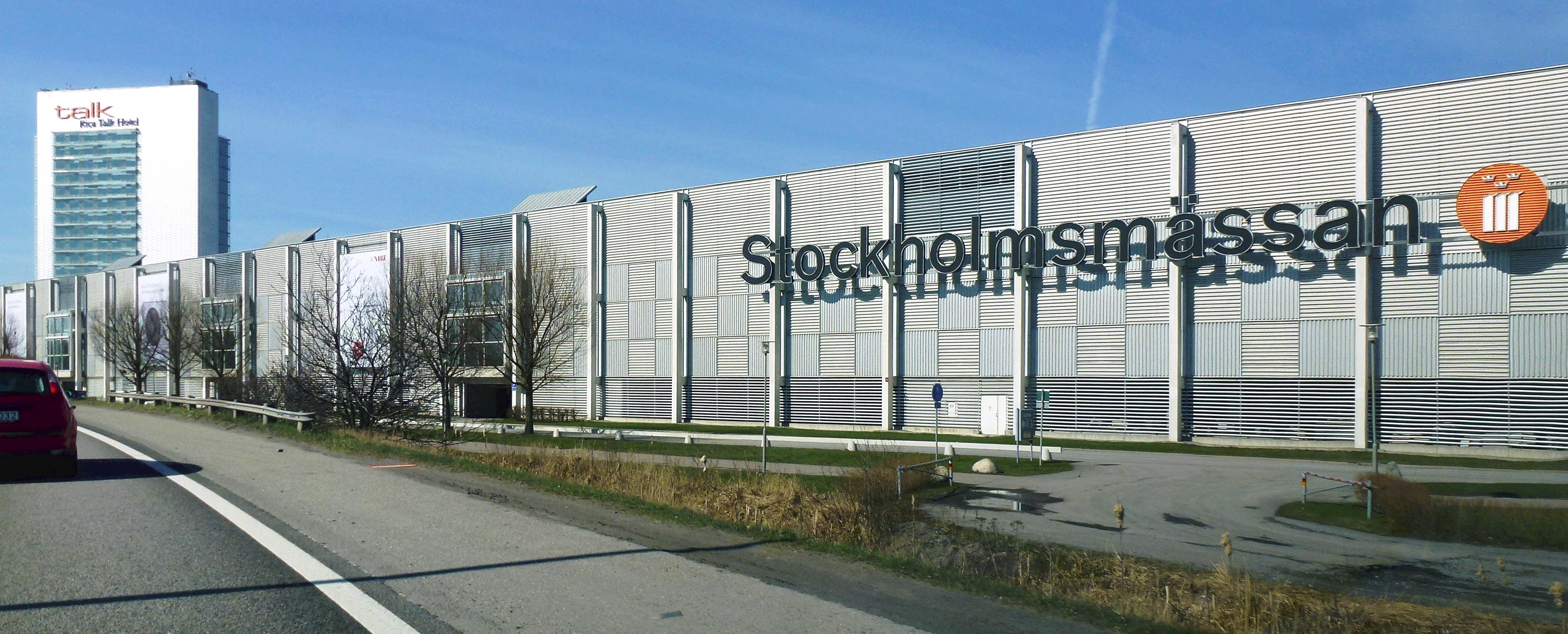 Stockholmsmässan och Rica Talk Hotel mot Huddingevägen